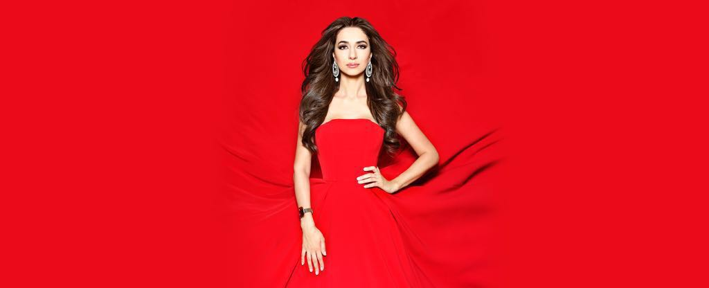 Российская певица Зара